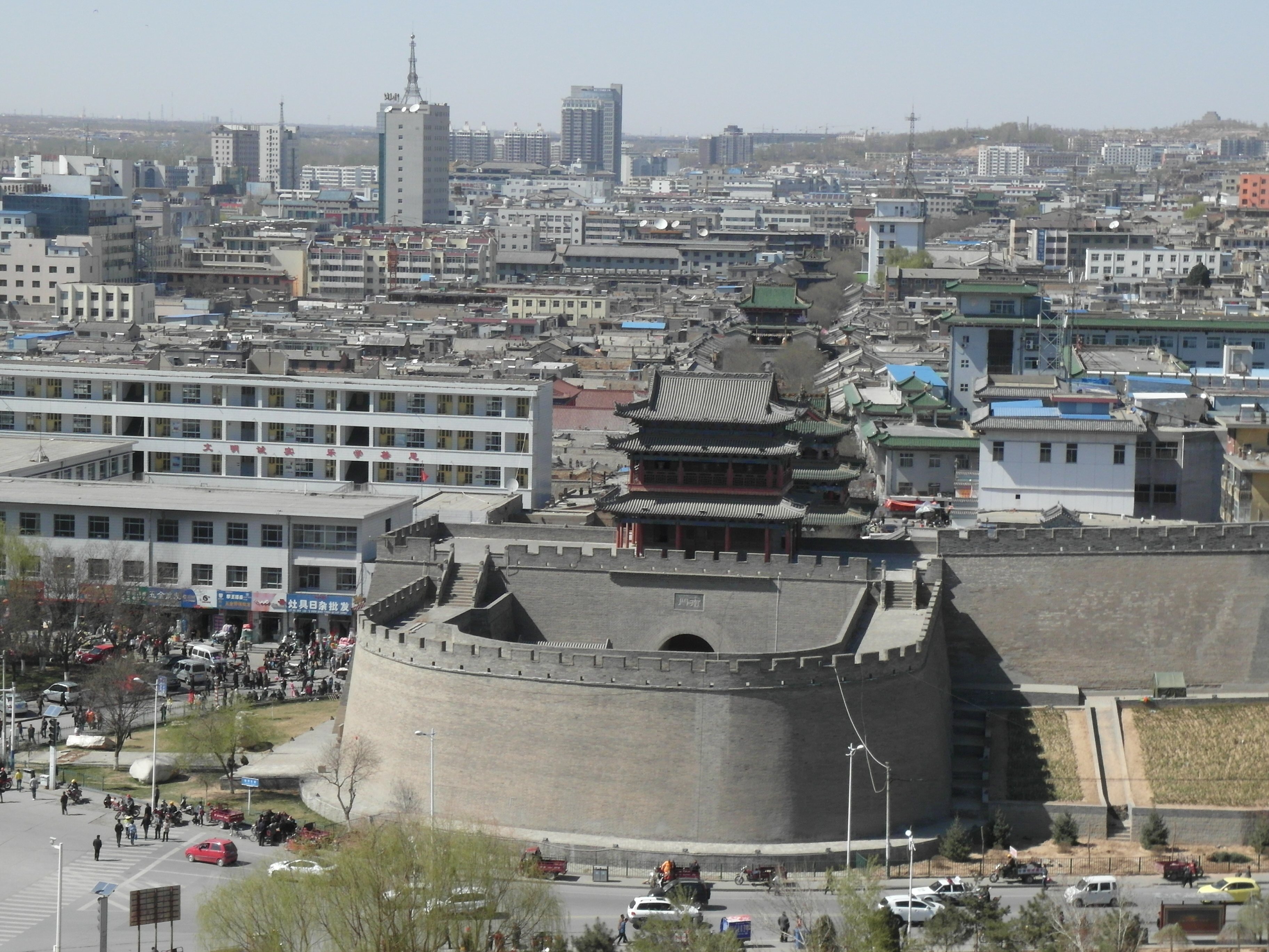 依次可见“六楼骑街”及远处的镇北台